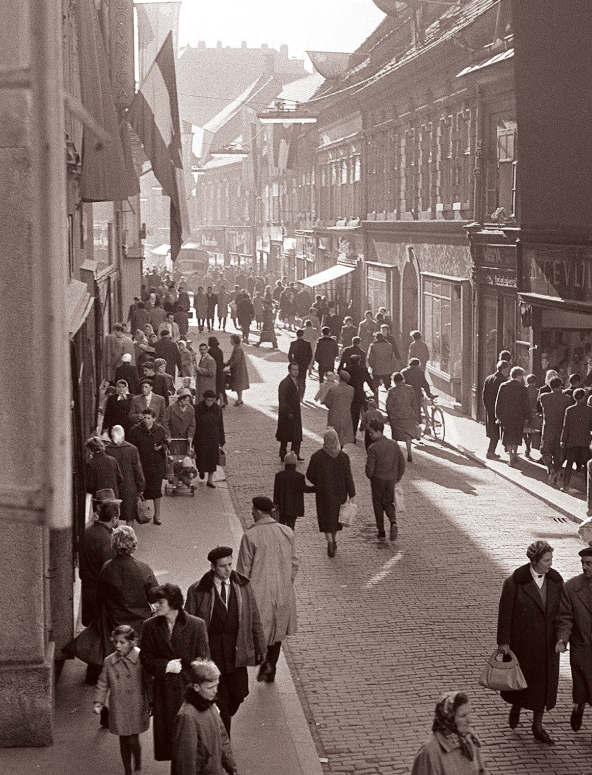 Gosposka ulica v Mariboru